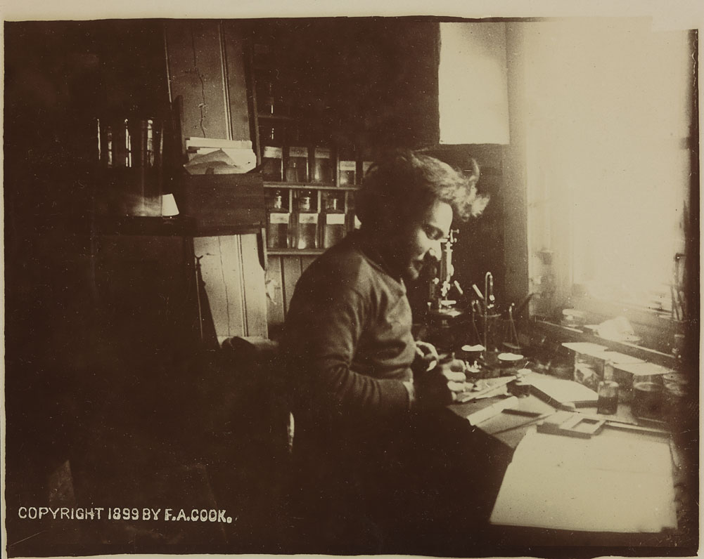 Tittel / Title: Biologen Emile Racovitza i "Belgica"s laboratorium Dato / Date: 1897-1899 Fotograf / Photographer: Frederick A. Cook (1865-1940) Sted / Place: Antarktis (om bord i "Belgica") Eier / Owner Institution: Nasjonalbiblioteket / National Library of Norway Lenke / Link: Bildesignatur / Image Number: bldsa_SURA0698